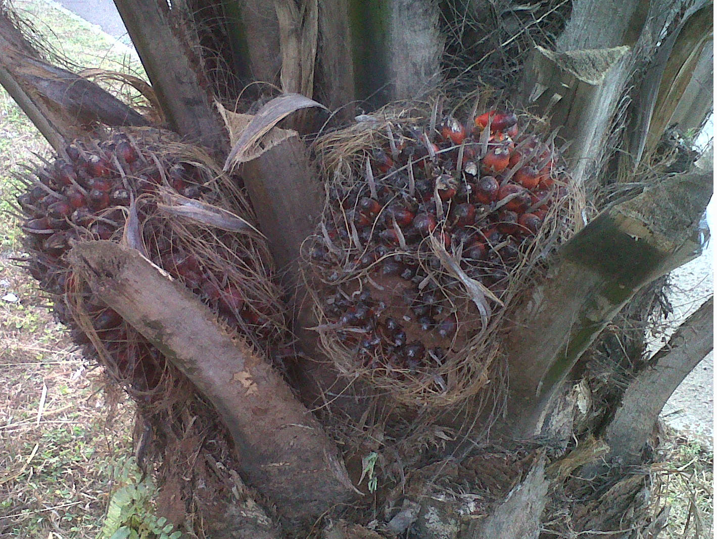 Kelapa sawit sebagai bahan utama dalam membuat minyak goreng